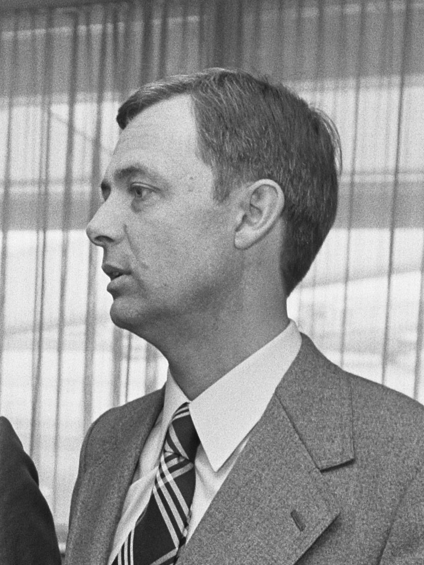 (...) naar Washington voor vervanging Starfighter; Erling Brøndum (Denemarken) (...)